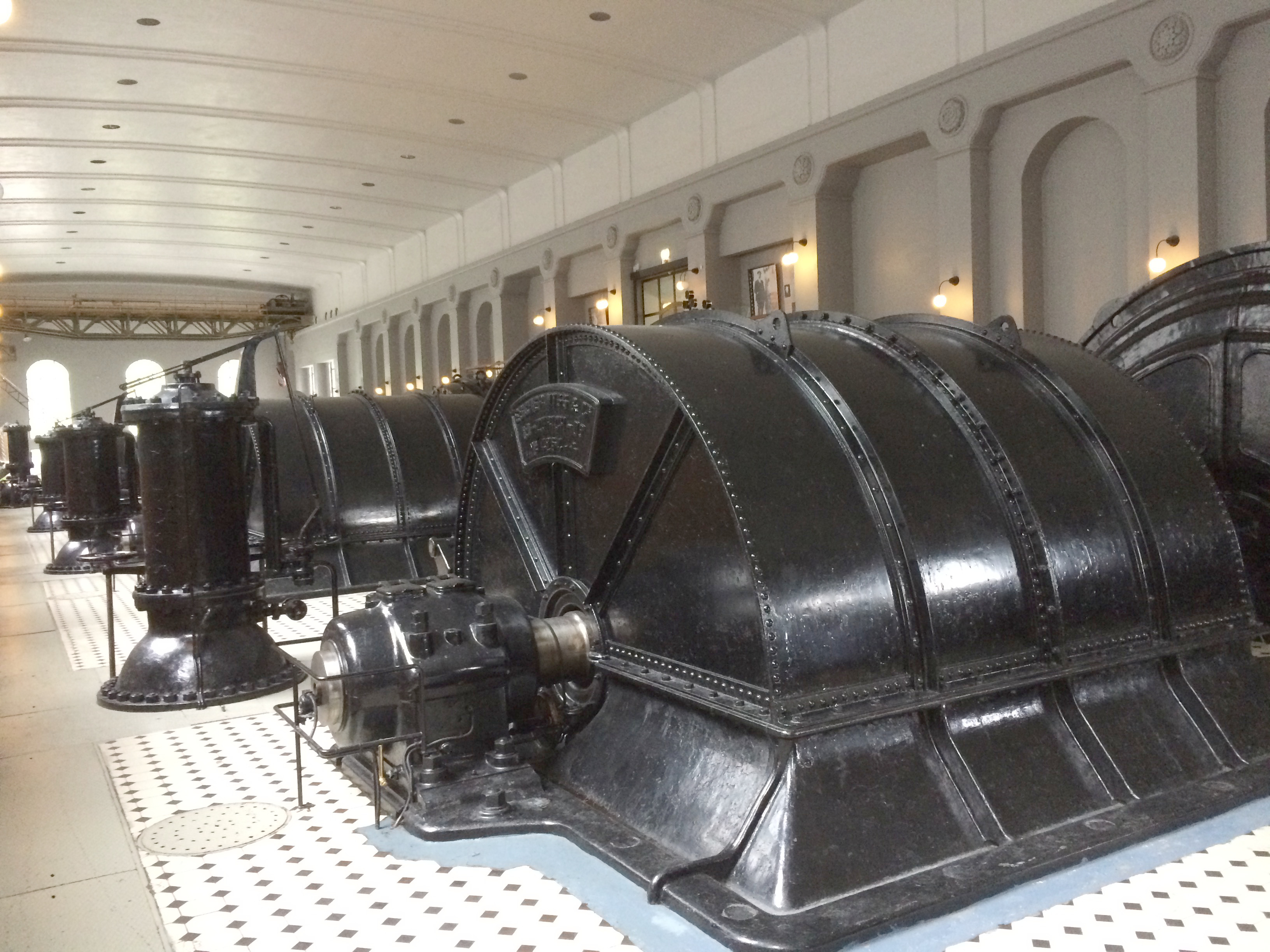 Turbiner på Vemork